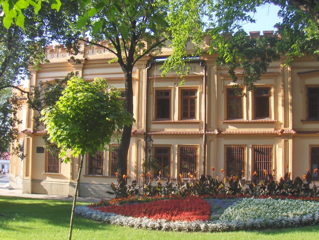 Wielicki magistrat. Zbudowany ok. 1893.